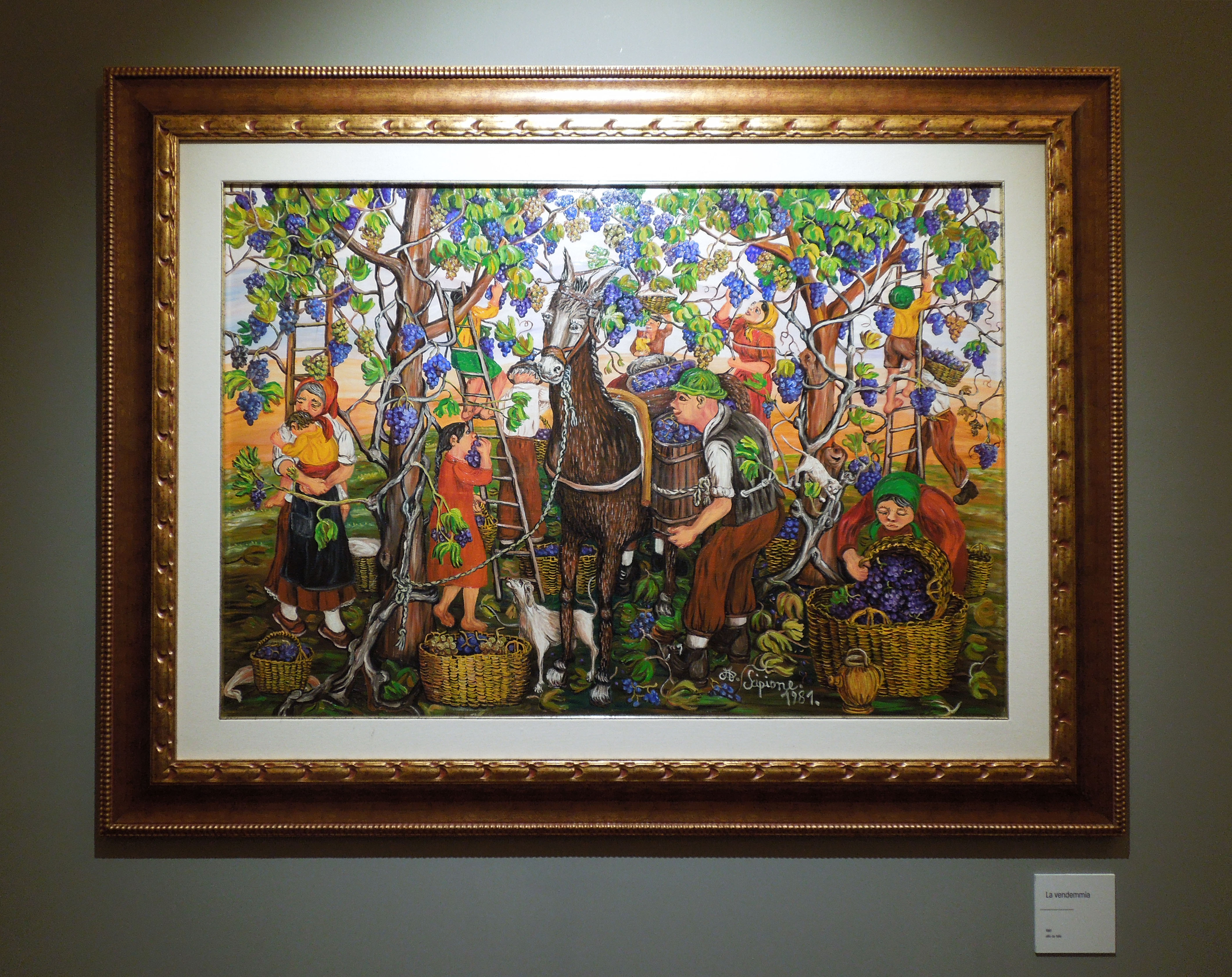 Dipinto intitolato La vendemmia, eseguito dalla pittrice Annunziata Scipione, fotografato presso Palazzo Melatino, sede delle Fondazione Tercas, a Teramo in occasione della mostra “Il fuoco della terra” dedicata alle opere dell’artista.